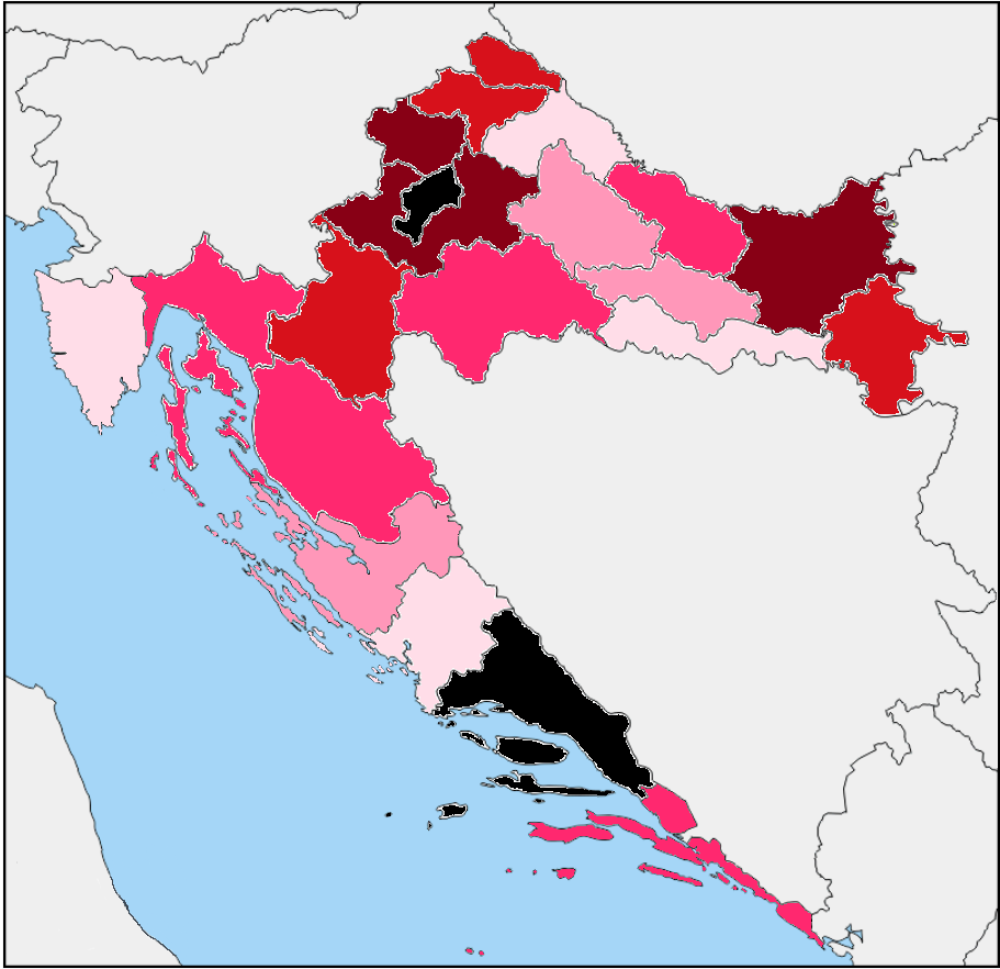 Better version